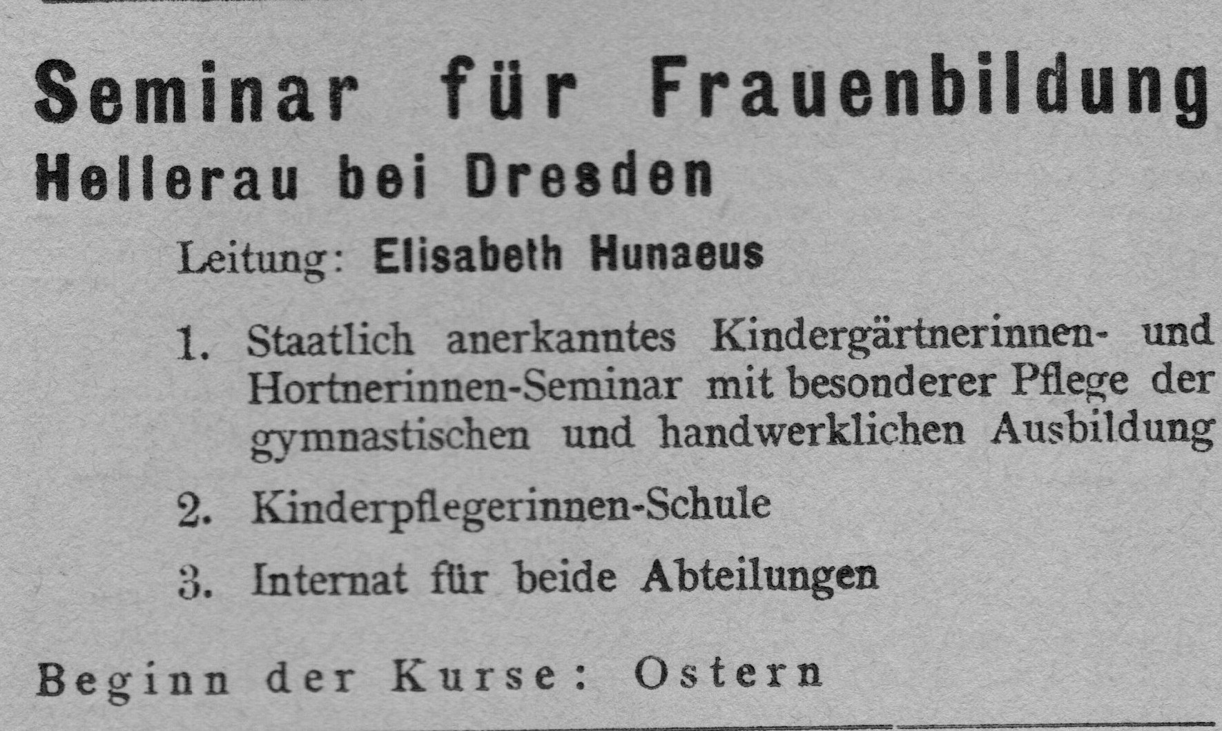 Werbung für das Semianr frü Frauenbildung